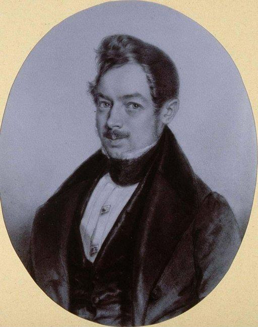 Jacques Rothmuller, dessinateur à Colmar (1804-1862). Revue alsacienne illustrée. 1910. Bibliothèque nationale et universitaire de Strasbourg